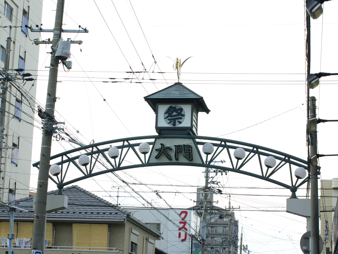 新大門商店街のシンボルアーチ